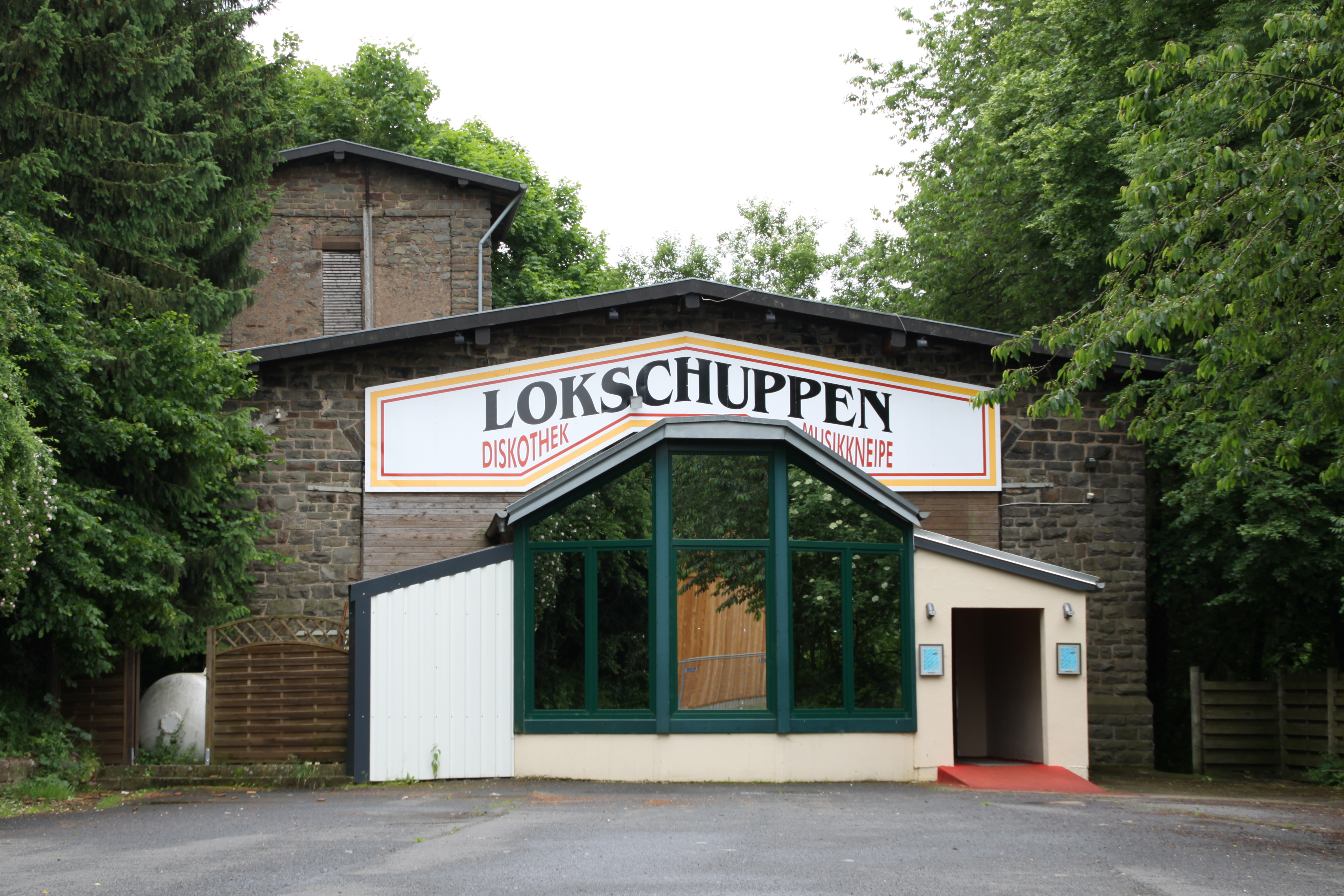 De fréiere Lokomotivschapp zu Waxweiler